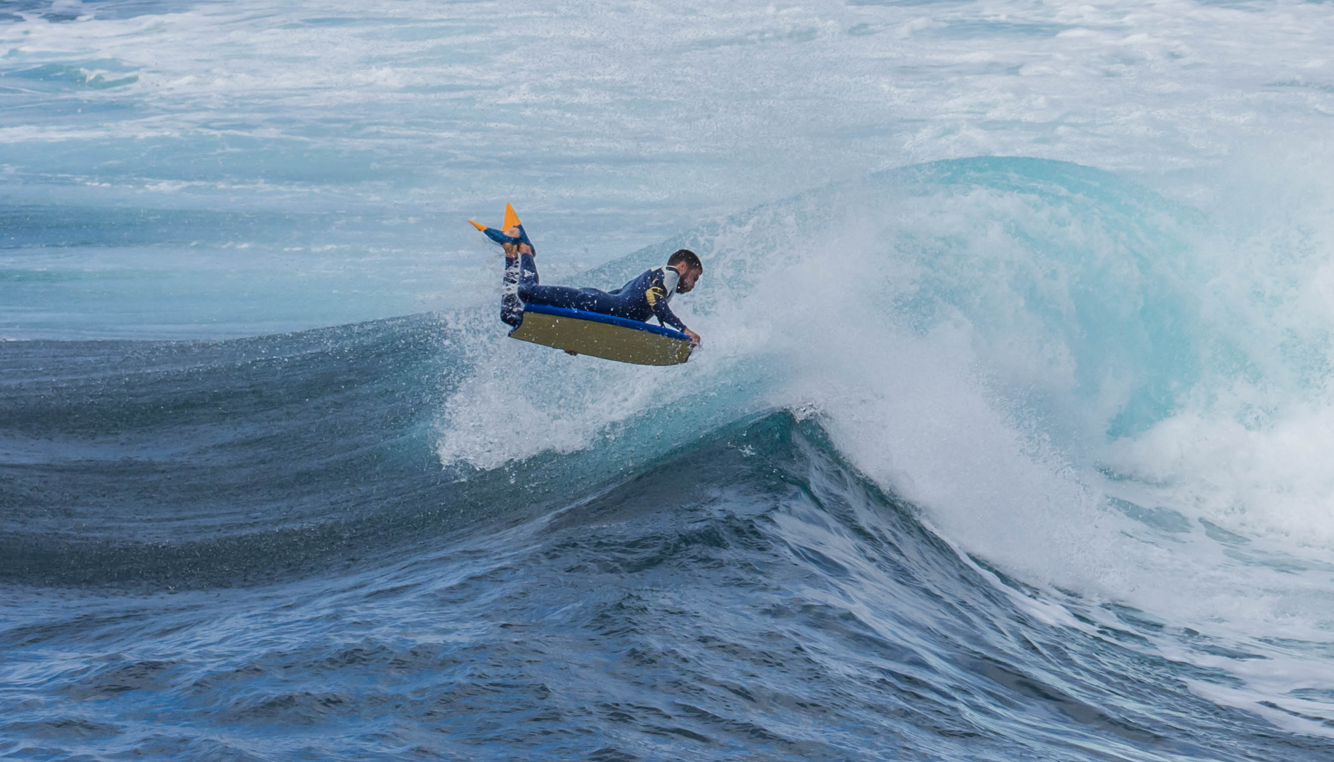 Playa Confital Las Palmas Gran Canaria